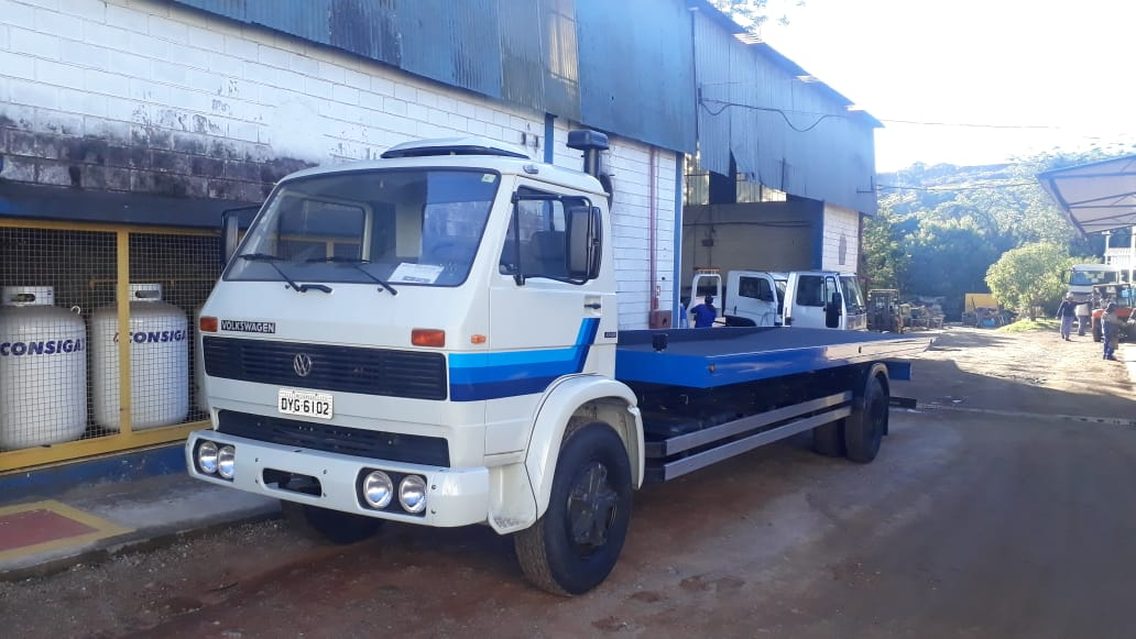 Caminhão VW 13.130 zero km no ano de 2019.